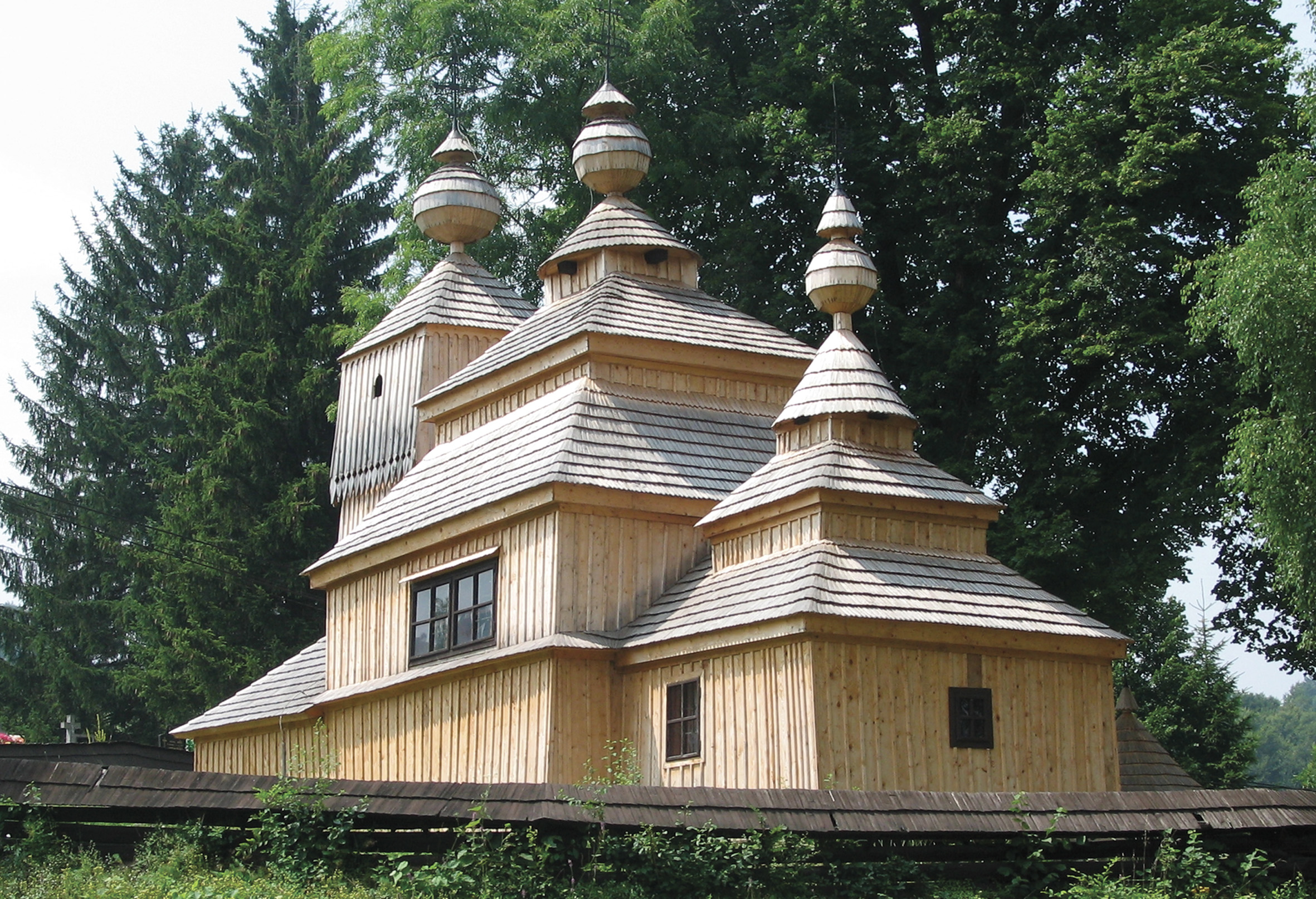 Bodružalská drevená cerkev je prototypom cerkvi tzv. lemkovského typu. Bola postavená v roku 1658 na východnom svahu Pelepče. Jej základ tvoria 3 spojené zrubové stavby v tvare troch štvorcov, postavených na jednej osi od východu na západ. Každý z troch zrubov je pokrytý stupňovanou ihlanovitou šindľovou strechou o dvoch poschodiach a dynamickou kompozíciou veží, ktoré postupne narastajú od malej východnej nad presbytériom cez strednú nad loďou k veľmi vyvinutej veží nad západným zrubom (babincom), kde je umiestnená aj zvonica. Nad stupňovitou ihlanovou strechou stredného a východného zrubu sú pristavené aj barokové makovičky s barokizujúcimi krížmi. This medium shows the protected monument with the number 712-1247/1 in the Slovak Republic.